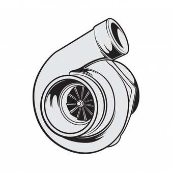 ਪੰਜਾਬੀ: ਟਰਬੋ ਚਾਰਜਰ